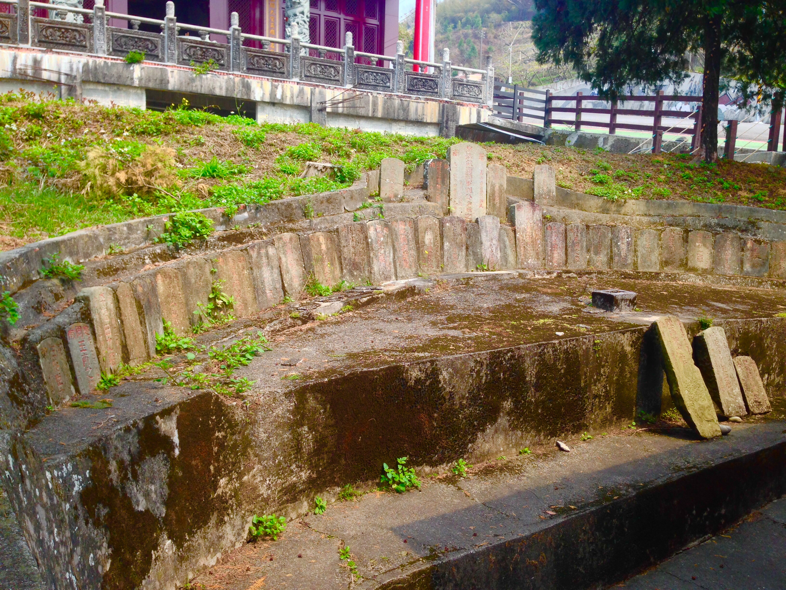 軍民廟墓碑